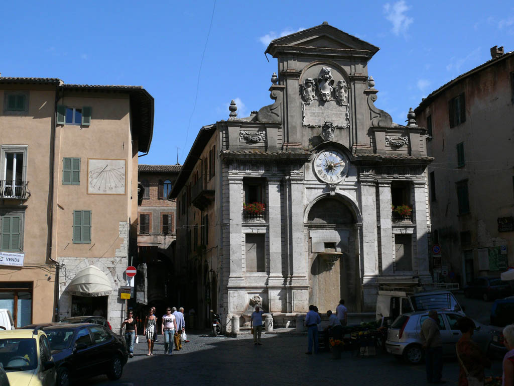 Spoleto: Piazza del Mercato